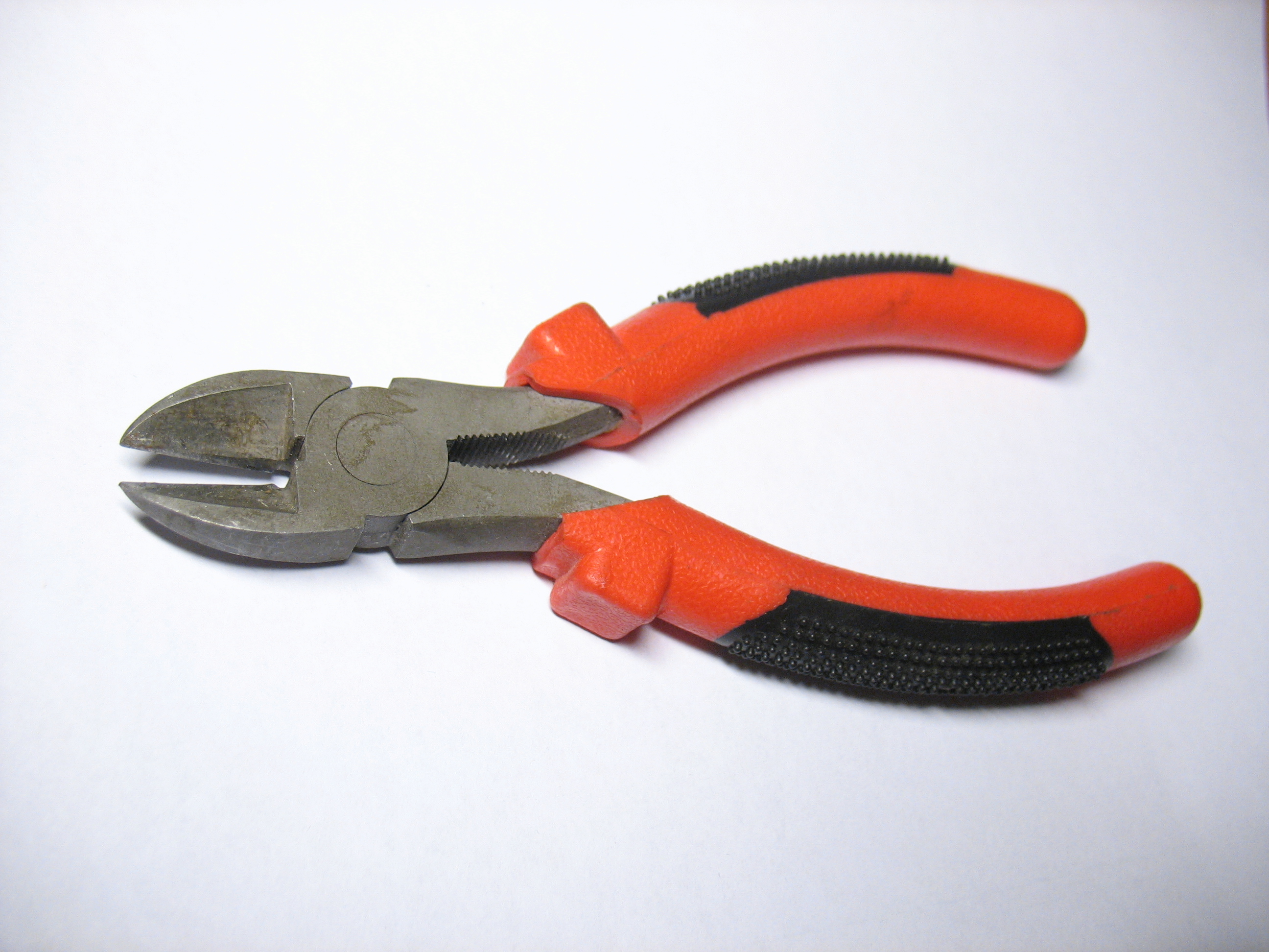 Обыкновенные слесарные кусачки